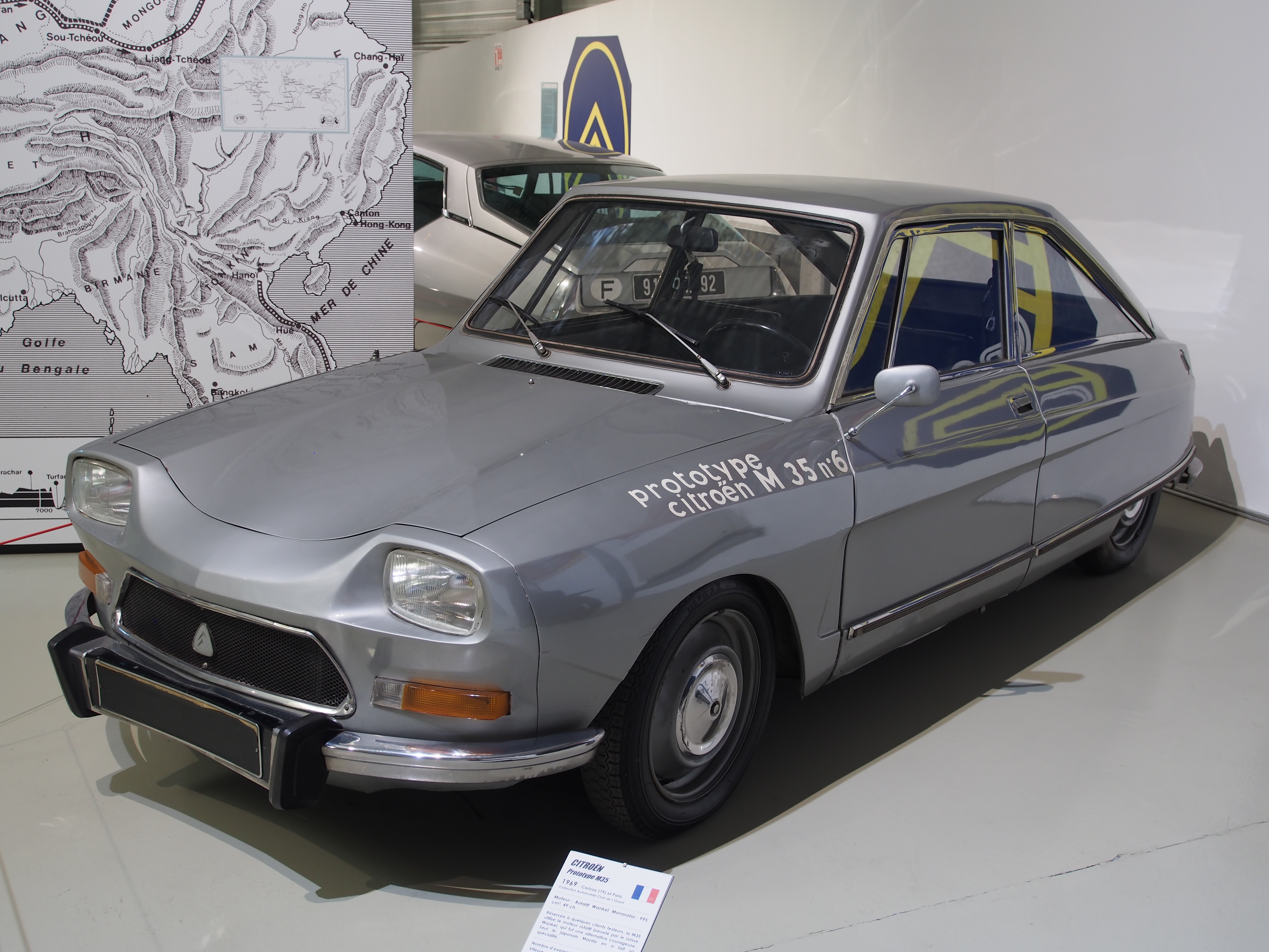 Photographed at Musée des 24 Heures du Mans, France.